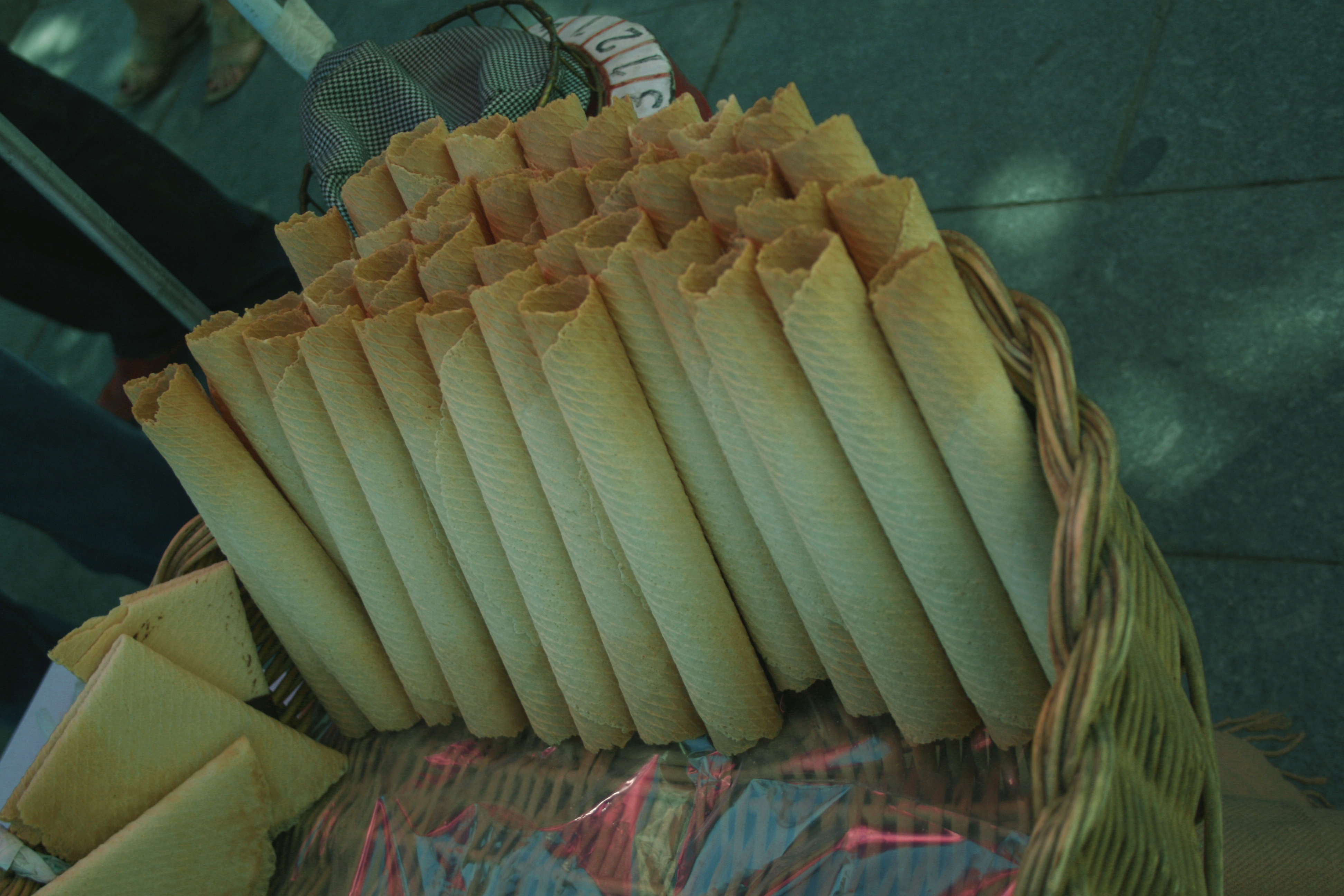 Waffelröllchen